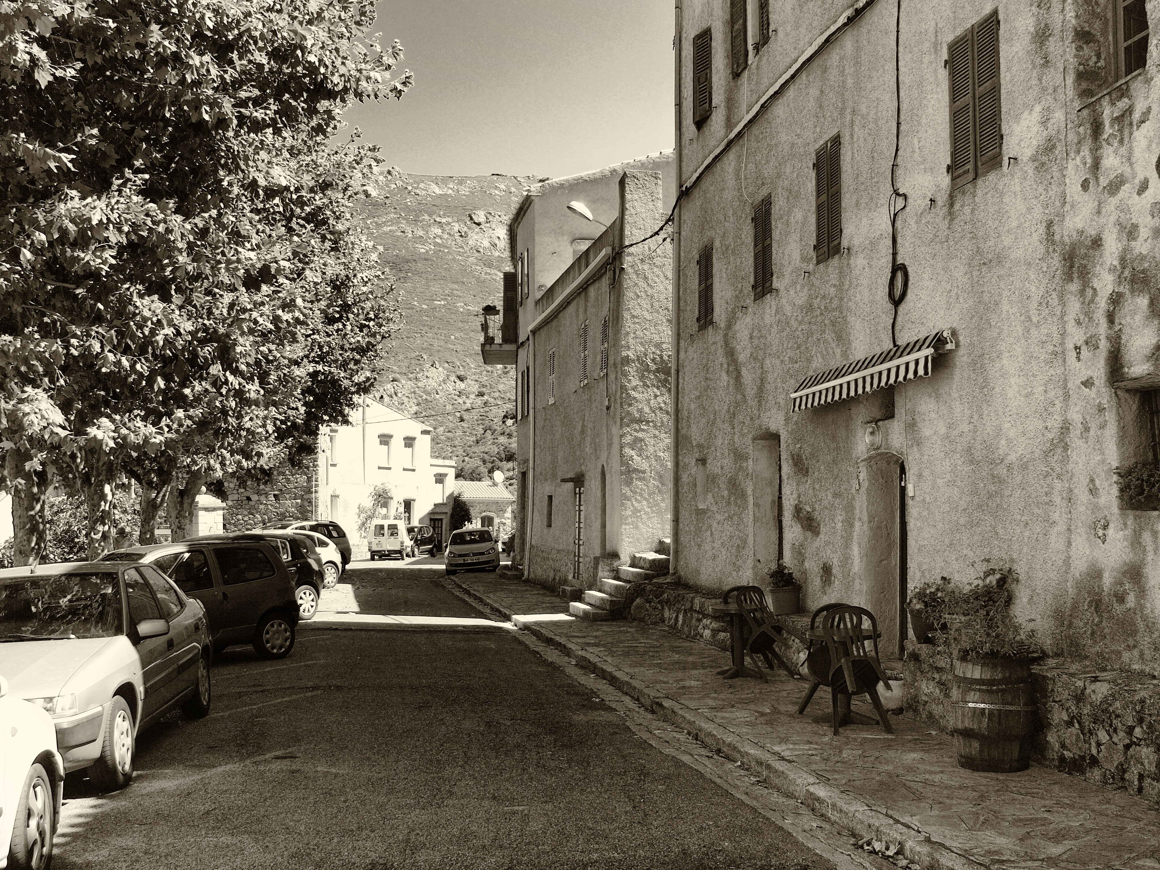 Nessa, Balagne (Corse) - Avenue Hui Bon Hoa, la rue du village